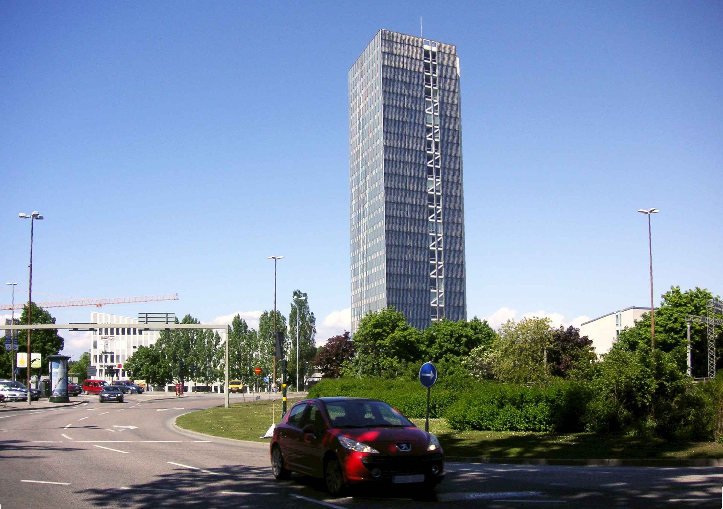 Sveaplan i Stockholm med Wenner-Gren-centret